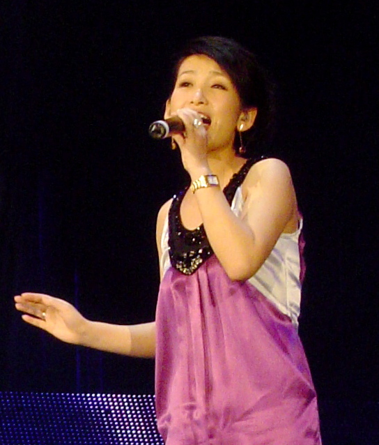 秦海璐